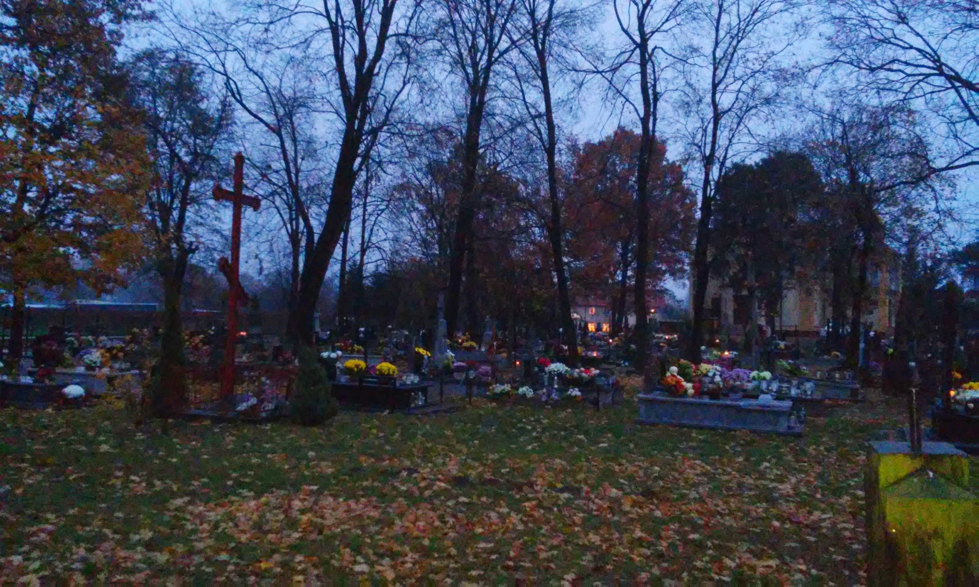 Cmentarz prawosławny w Białej Podlaskiej. Miejsce, na którym dawniej znajdowała się cerkiew parafialna